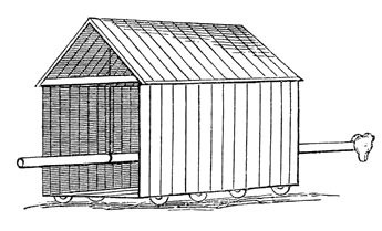 Römischer Mauerbrecher oder Sturmbock